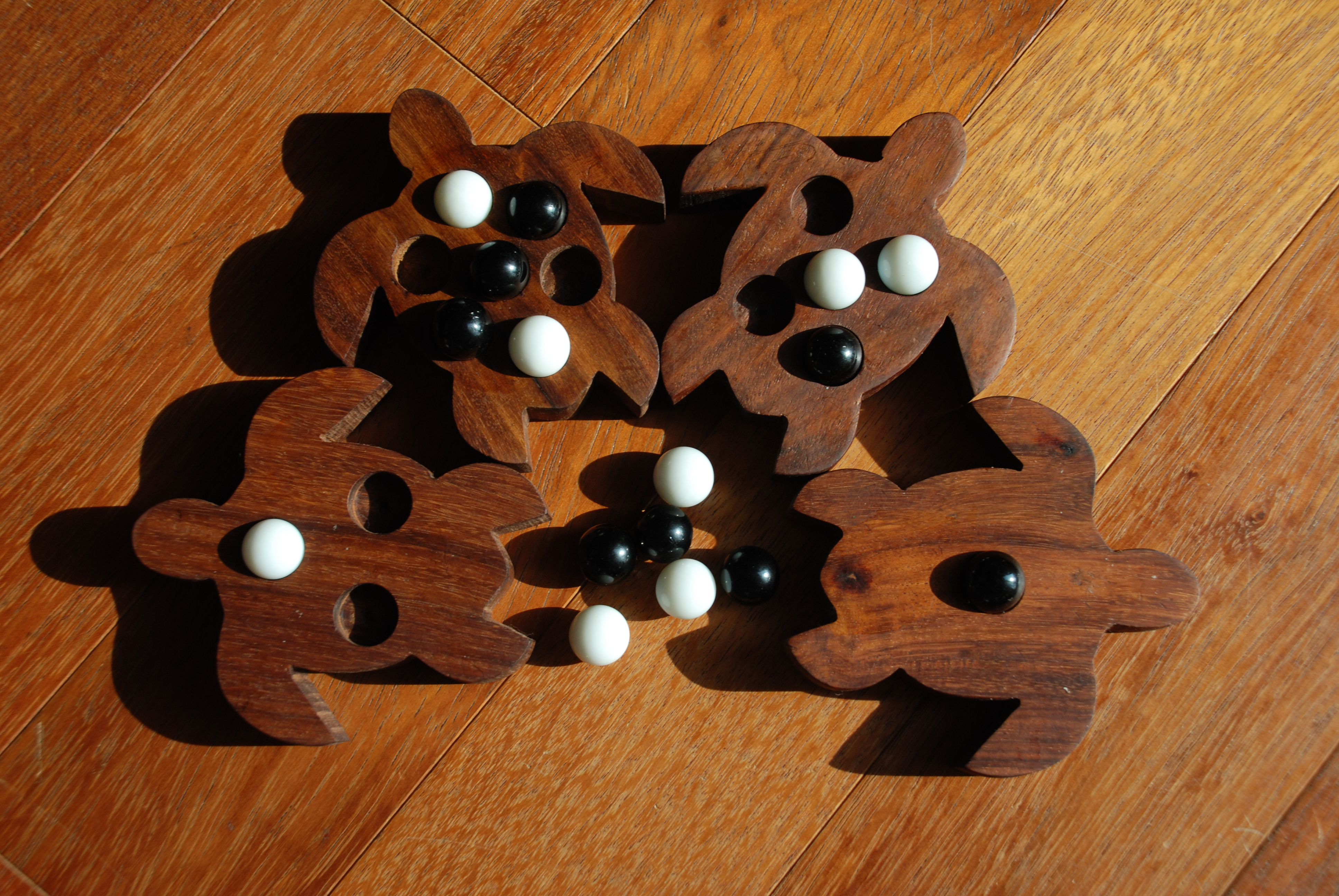 Photographie du matériel de la première édition du jeu Apagos.